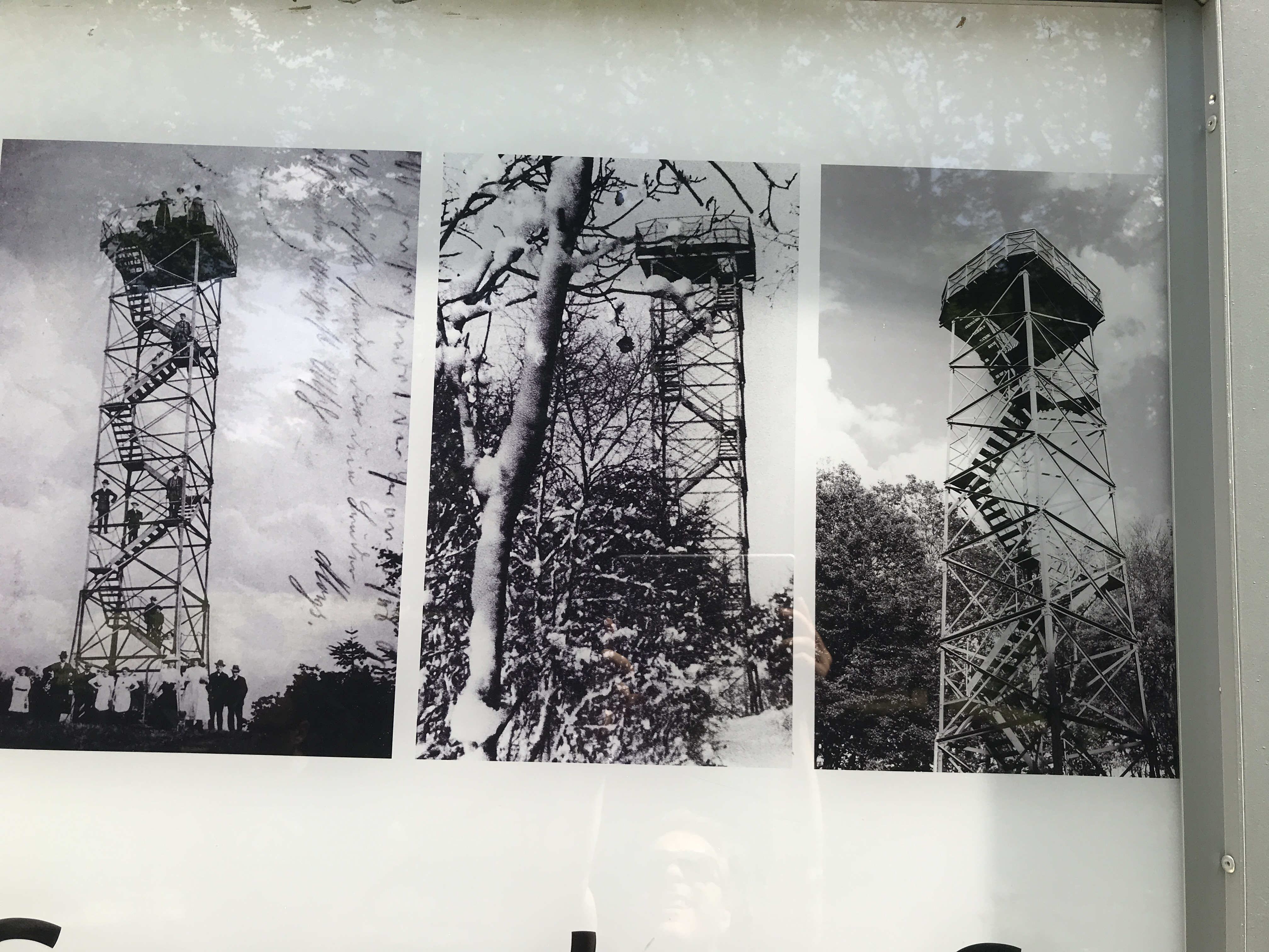 Ottoturm Infotafel Historische-Aufnahmen (1/2)